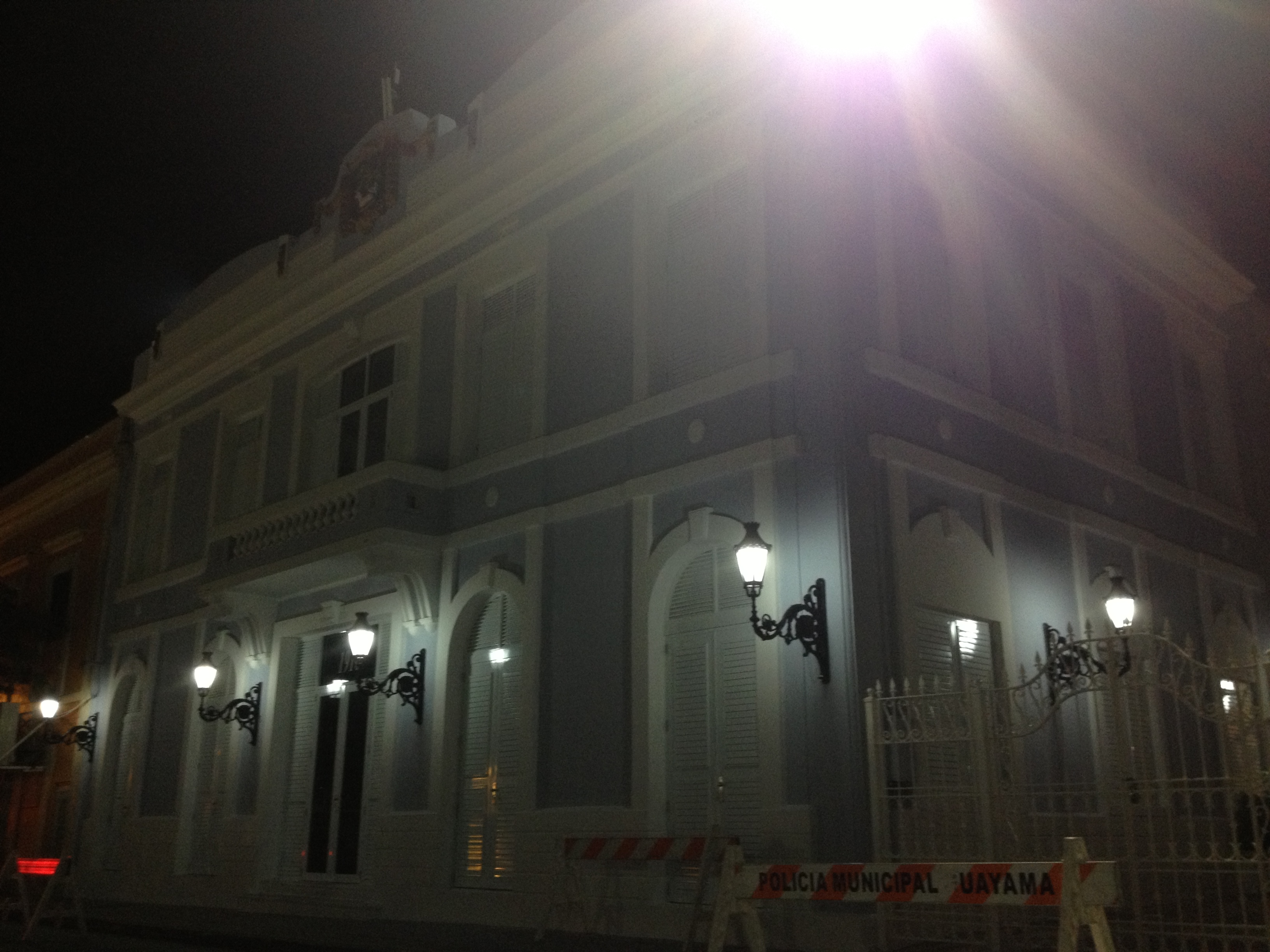 Se encuentra frente a la Plaza de Recreo. Fué Construída en el 1832 per, hubieron 2 incendios que afectaron a la alcaldía y fue reconstruida en el año 1850. En el año 2012 la alcaldía fue remodelada.